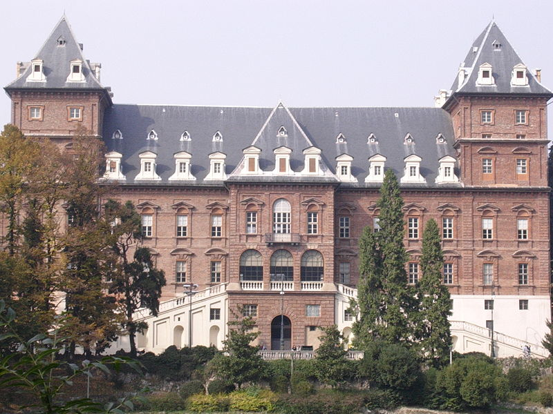 Façade arrière du Castello Valentino